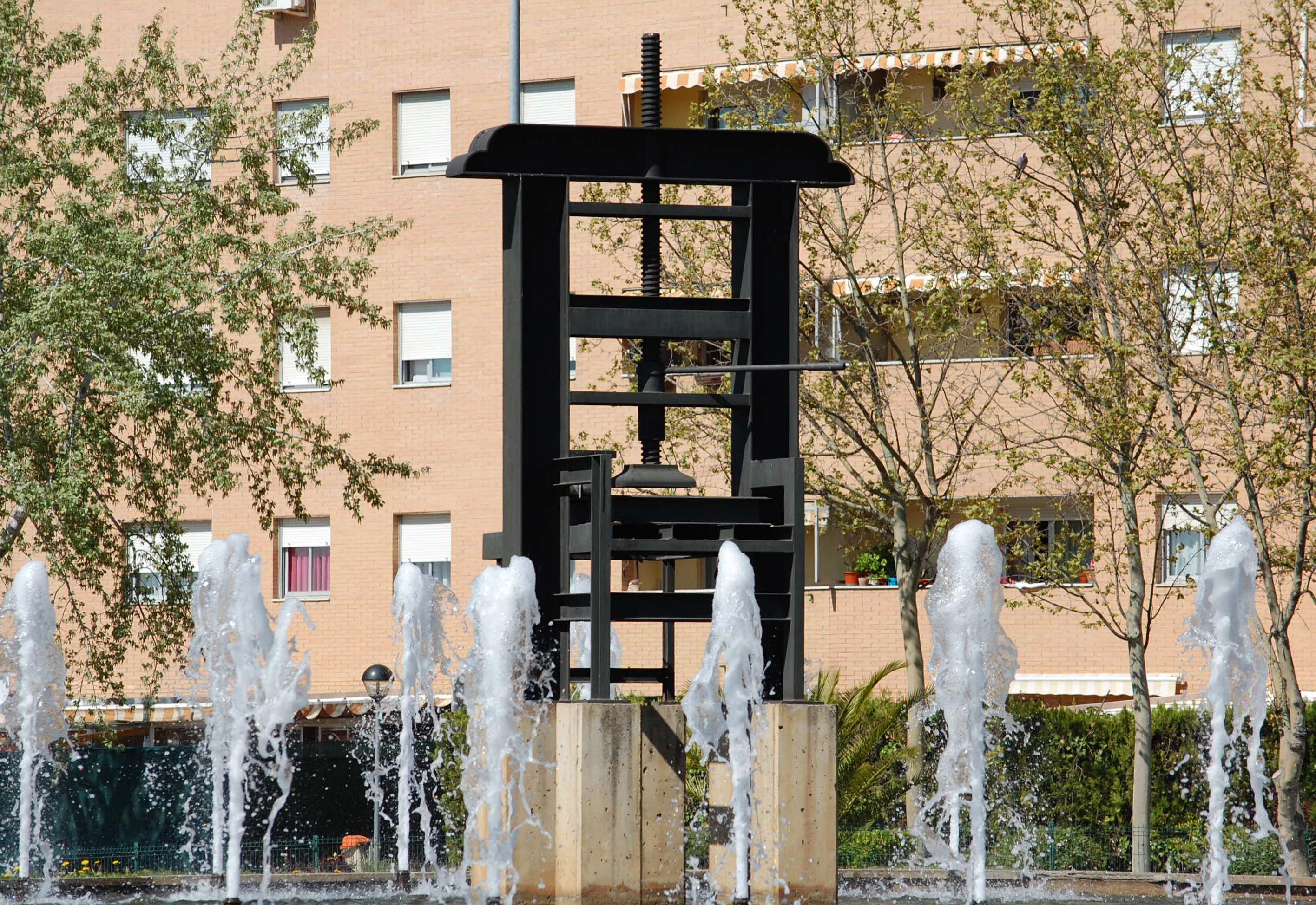 Fuente monumental dedicada a los Impresores de Alcalá de Henares, situada en la plaza Alfonso XII de Alcalá de Henares (Comunidad de Madrid - España). En su proximidad, se acompaña de un friso de azulejos con un listado de los principales impresores que han tenido su taller en Alcalá de Henares desde el siglo XVI.